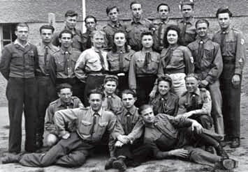 Беларуская (тарашкевіца): Пачынальнікі беларускага скаўтынгу на Захадзе, у тым ліку чатырох сяброў будучай Дванаццаткі (Алесь Бута, Леанід Карась, Янка Жучка й Паўлюк Урбан). Рэгенсбург, вясна 1946 г.